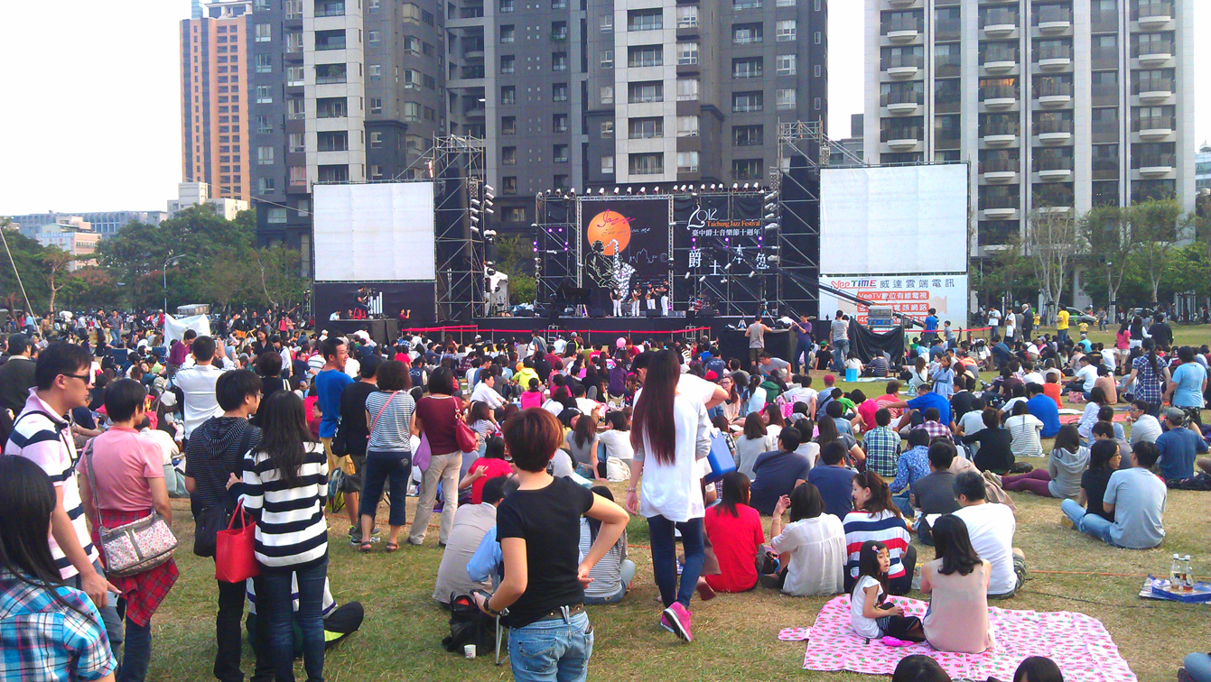 2012台灣爵士音樂節開幕